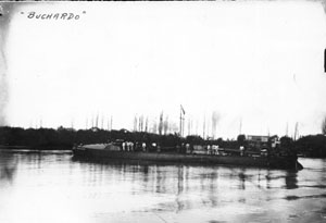 Torpedera de Mar de 1ra clase Buchardo en 1891.